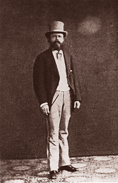 Fridrich František (1829-1892) kolem roku 1860